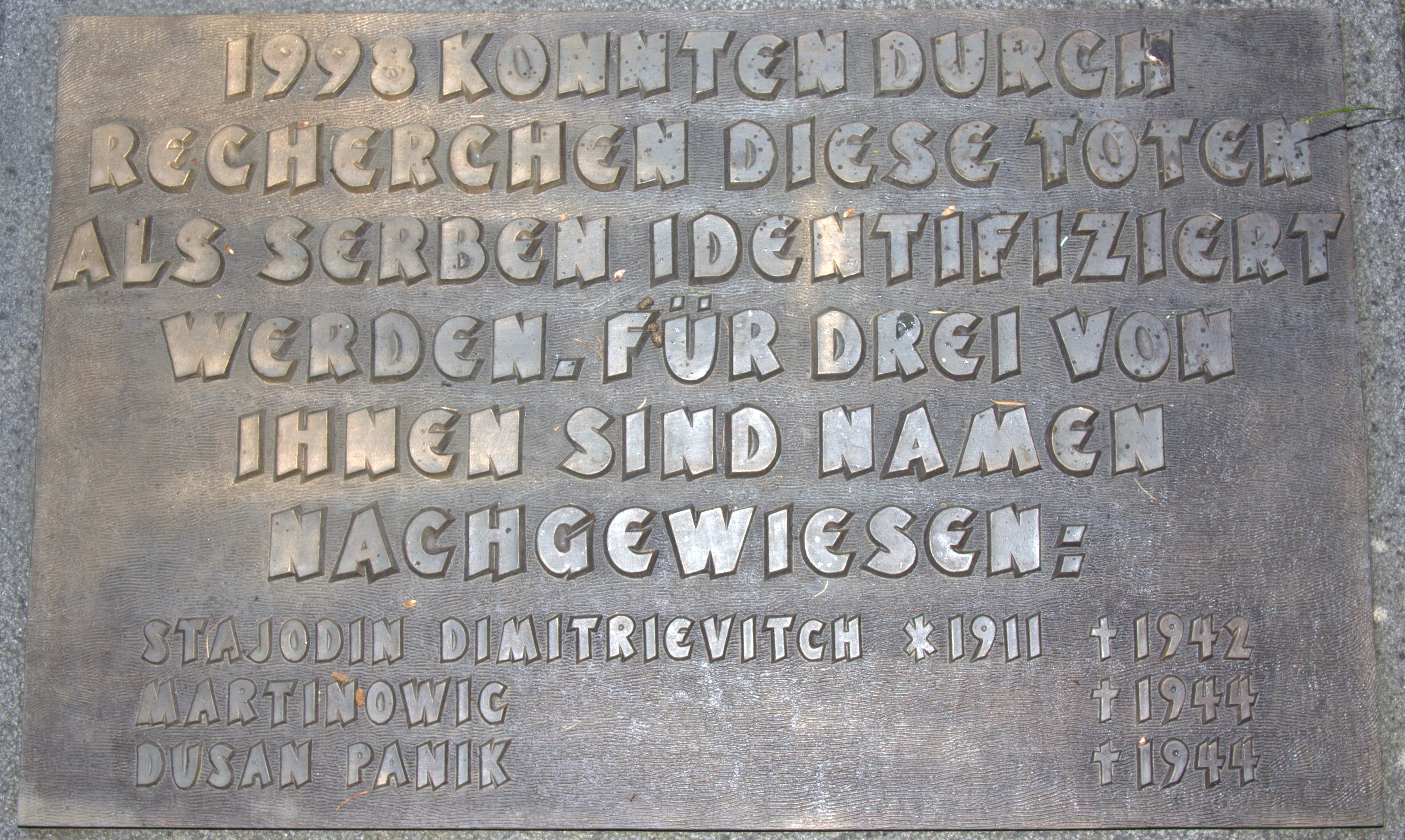 Gedenktafeln für die Ehrung der verstorbenen des Kriegsgefangenenlagers Stalag IX A Ziegenhain